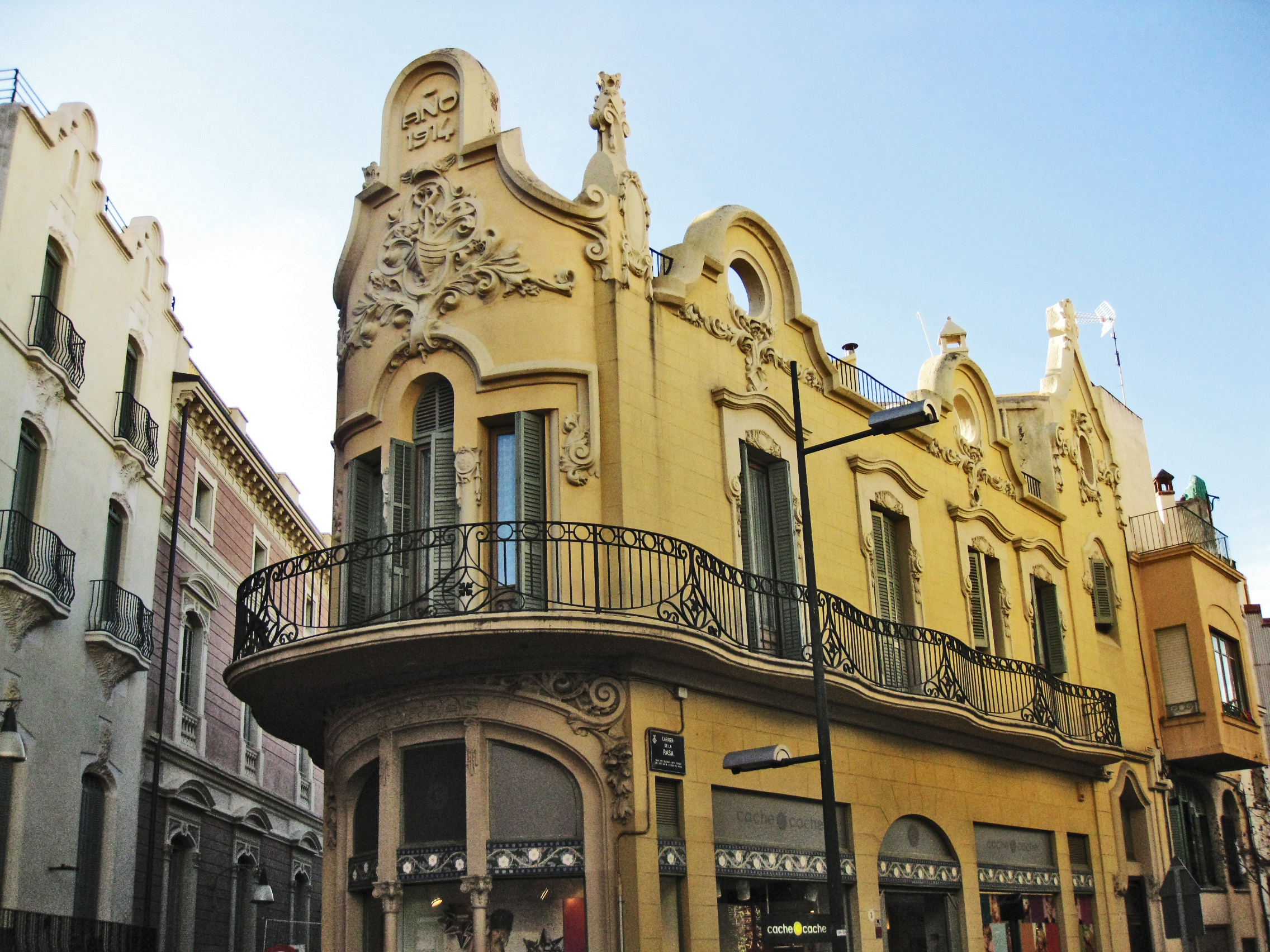 Magatzems Torras, coneguts com Cal Sastre d'Olesa, façana del carrer de la Rasa (Terrassa). Edifici modernista de Melcior Viñals (1914).